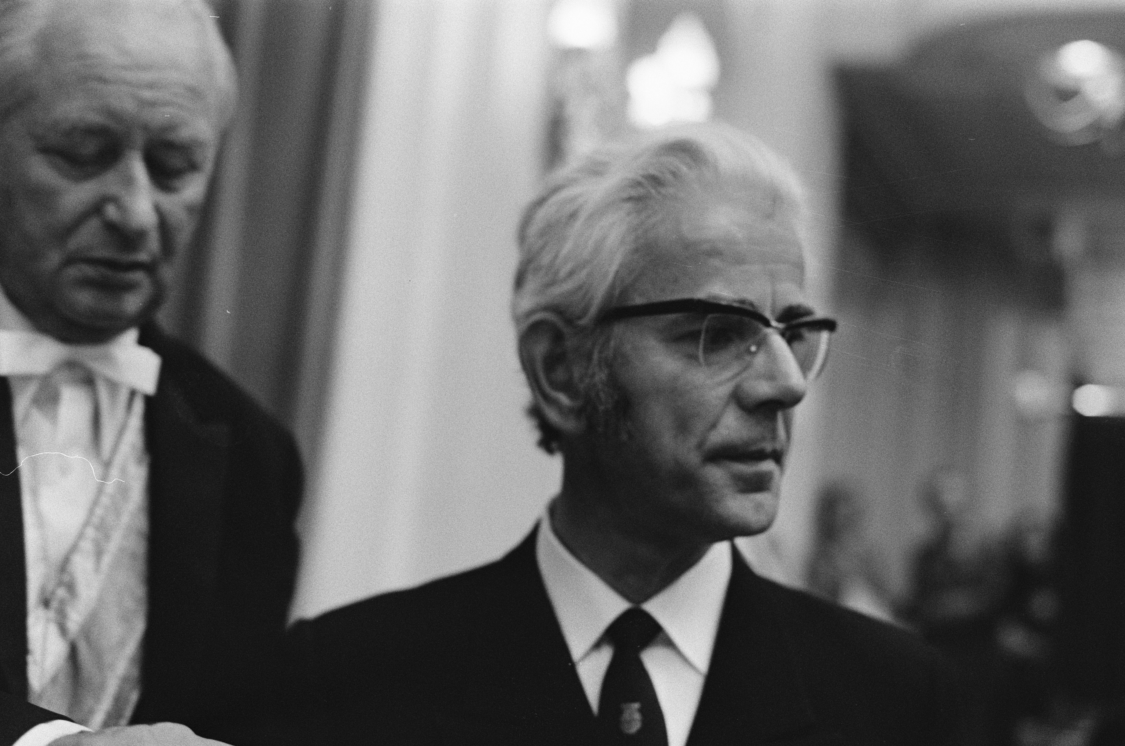 Collectie / Archief : Fotocollectie Anefo Reportage / Serie : Prinsjesdag 1975 Beschrijving : Opening Staten-Generaal; eedsaflegging nieuw PPR-kamerlid M.W.M. van Winkel Datum : 16 september 1975 Locatie : Den Haag, Zuid-Holland Trefwoorden : overheidsbegrotingen, parlementariërs, politiek, portretten Persoonsnaam : Winkel, M.W.M. van Instellingsnaam : Tweede Kamer Fotograaf : Bert Verhoeff / Anefo Auteursrechthebbende : Nationaal Archief Materiaalsoort : Negatief (zwart/wit) Nummer archiefinventaris : bekijk toegang 2.24.01.05 Bestanddeelnummer : 928-1566